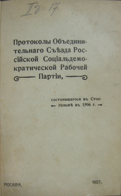 Protokoli Obyedinitel’nago Syezda Rossiyskoy Sozial’demokraticheskoy Rabochey Partii, sostoyavshagosya v Stokgol’me v 1906 - Moskva 1907 - copia del bibliofilo italiano Paolo Barbieri